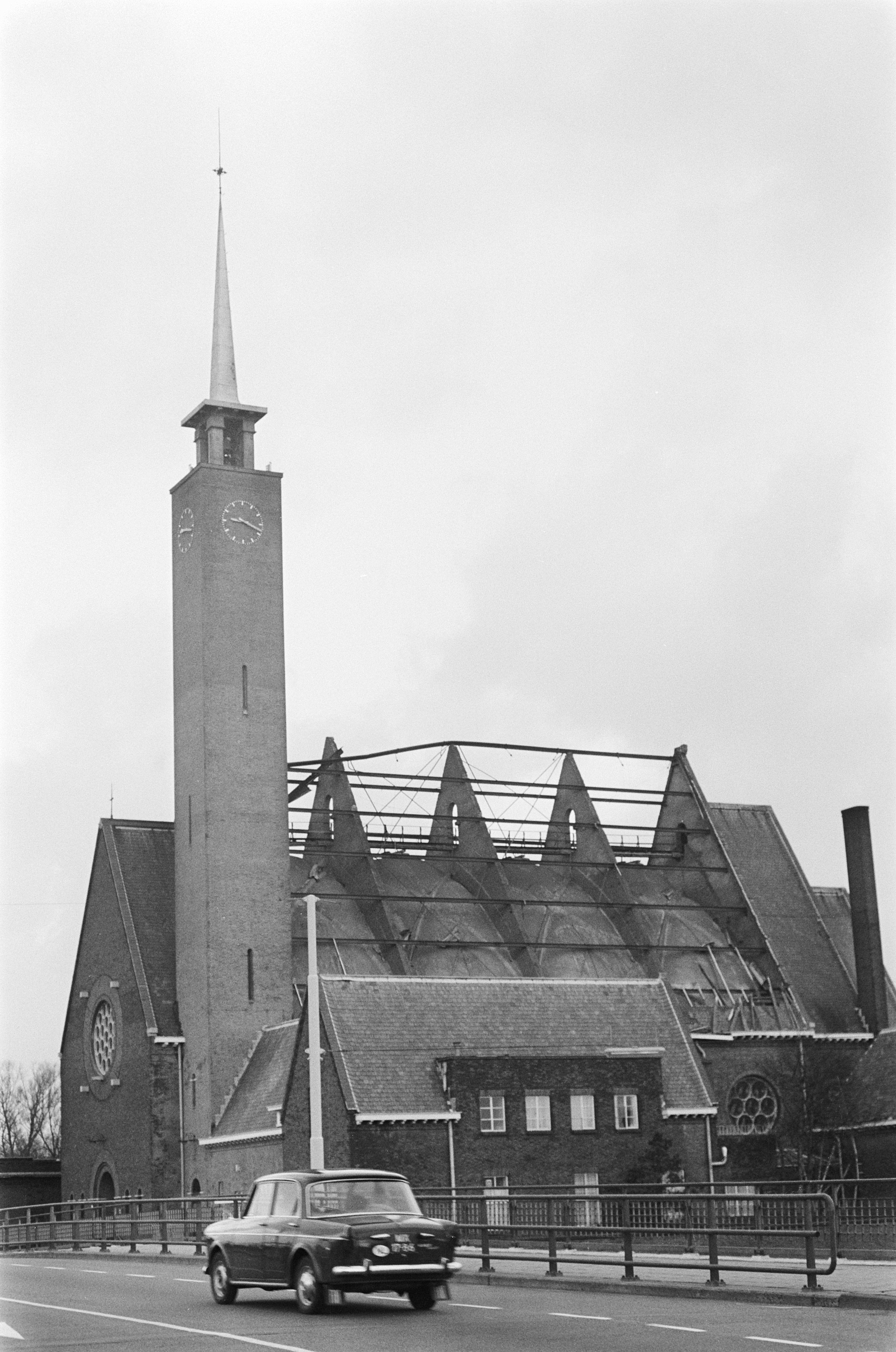 Collectie / Archief : Fotocollectie Anefo Reportage / Serie : [ onbekend ] Beschrijving : Schade door hevige storm; dak van St. Annakerk in Amstelveen gewaaid Datum : 3 januari 1976 Locatie : Amstelveen, Noord-Holland Trefwoorden : daken, schades, stormen Fotograaf : Mieremet, Rob / Anefo Auteursrechthebbende : Nationaal Archief Materiaalsoort : Negatief (zwart/wit) Nummer archiefinventaris : bekijk toegang 2.24.01.05 Bestanddeelnummer : 928-3422